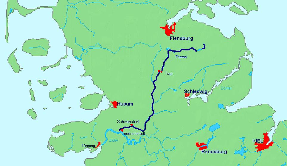 Karte des Verlaufs der Treene